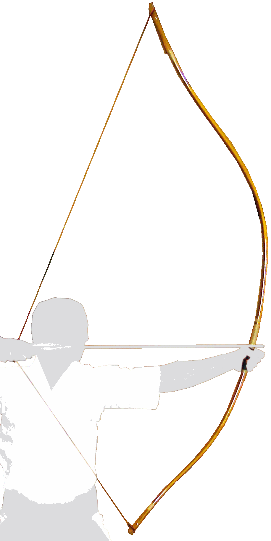 Kyudo, Yumi à Kai, ouverture de l'arc juste avant le tir